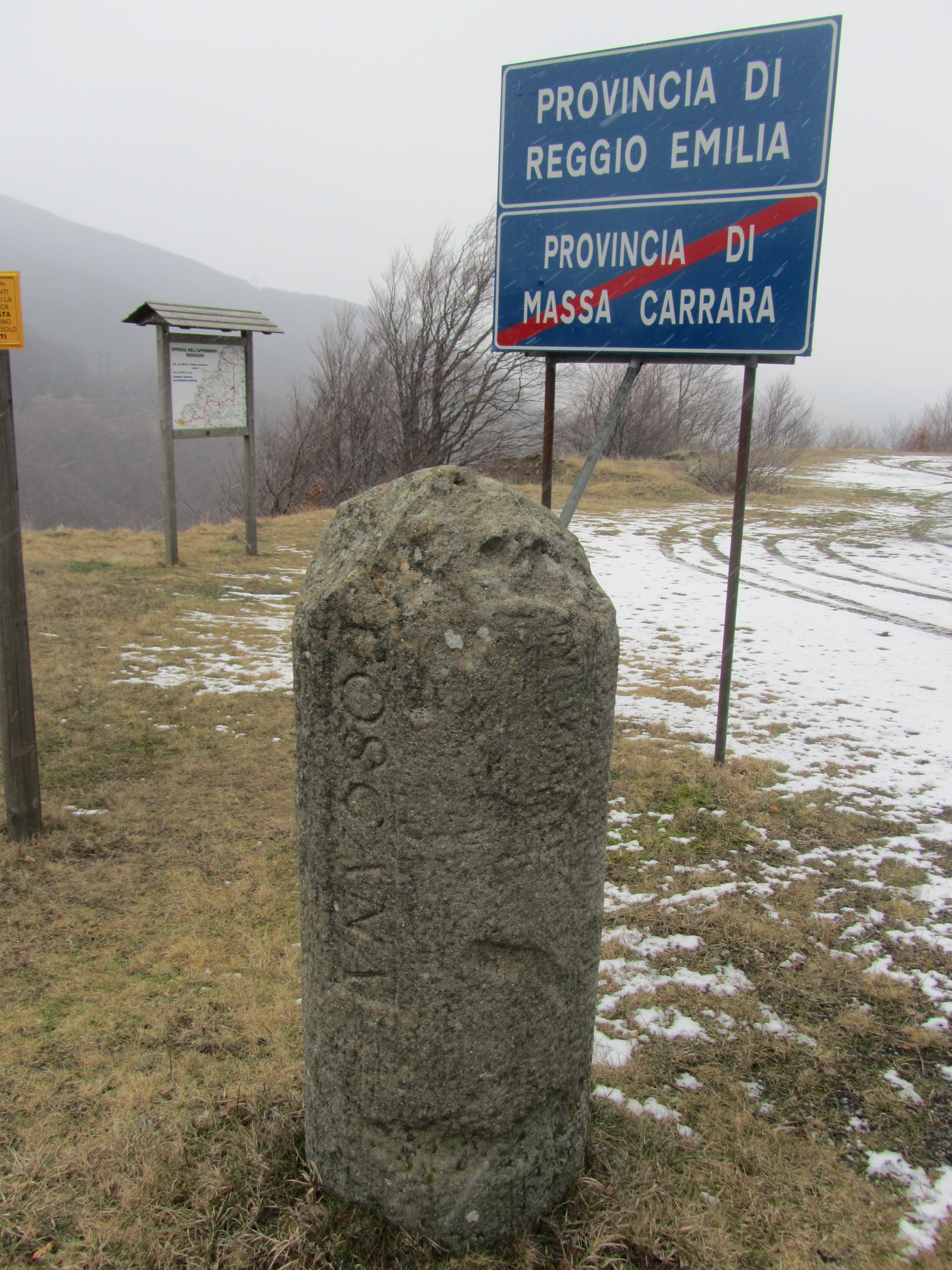 Cippo di confine tra il Ducato di Parma e il Granducato di Toscana, Miscoso, provincia di Reggio nell'Emilia.